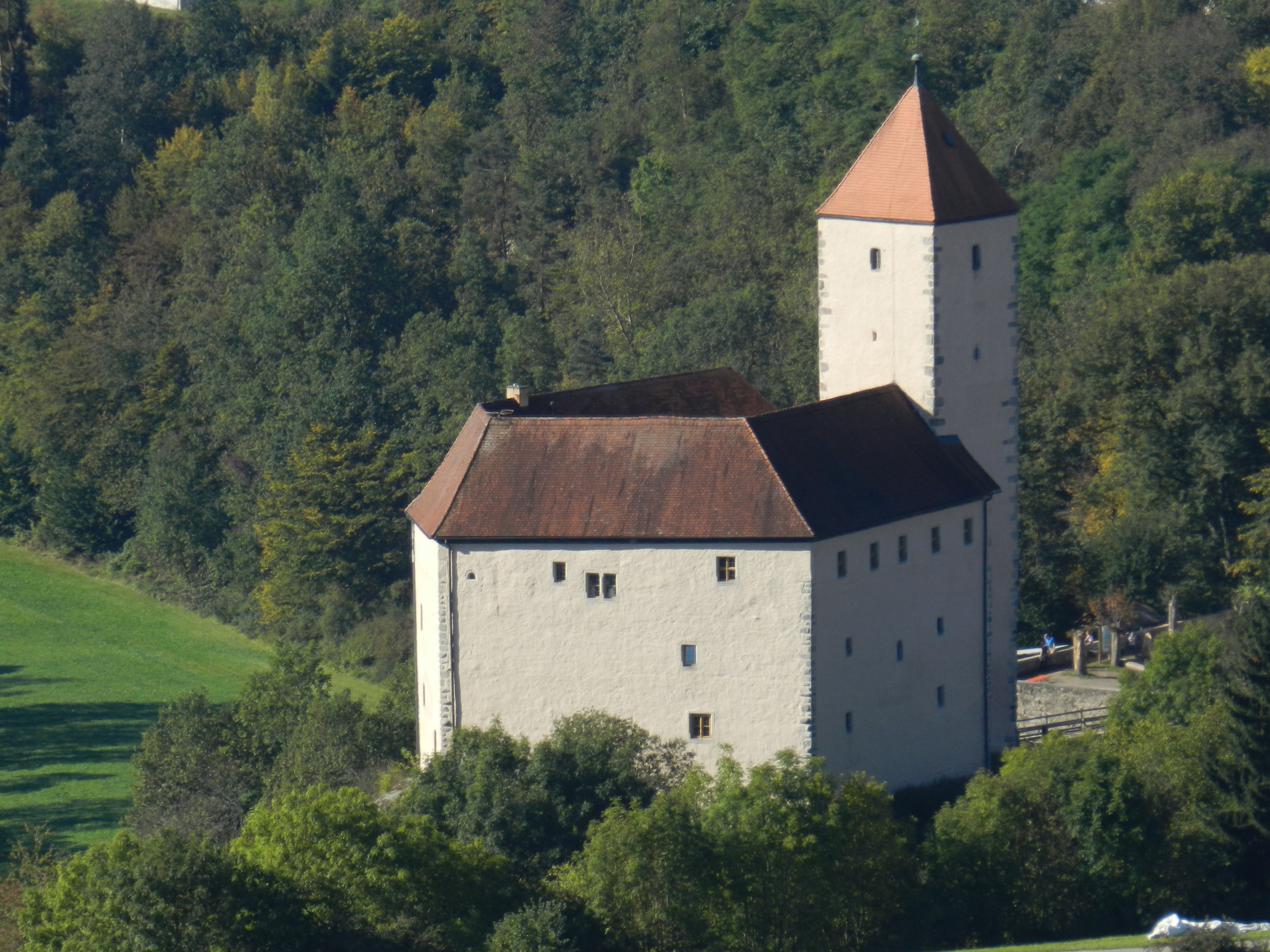 Burg Trausnitz im Tal, Trausnitz, Landkreis Schwandorf, Oberpfalz, Bayern: Die Burg ist zu einer Jugendherberge umgebaut. (2011)